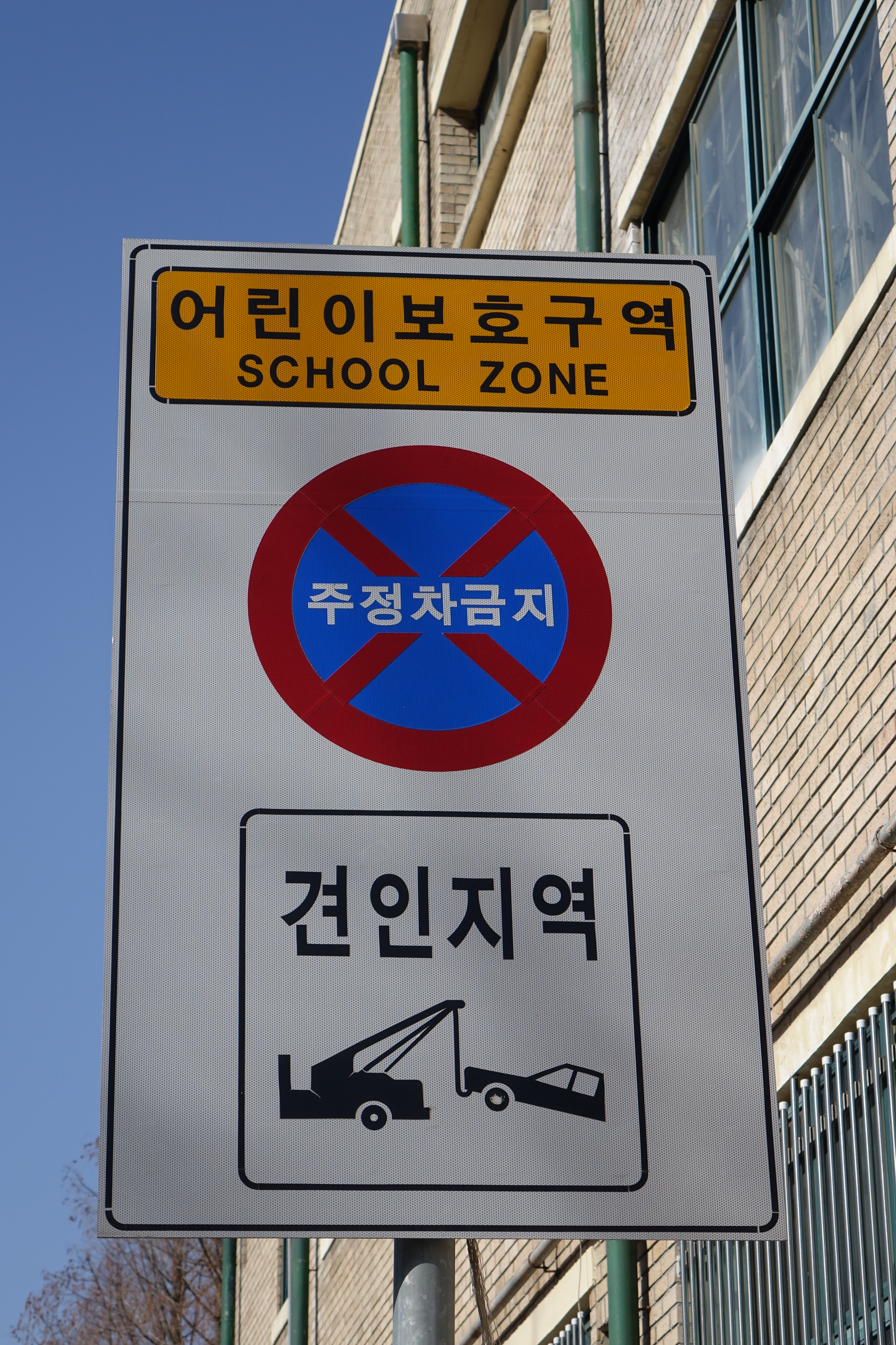 어린이보호구역 주정차금지 견인지역 안내표지(과천고등학교 앞)